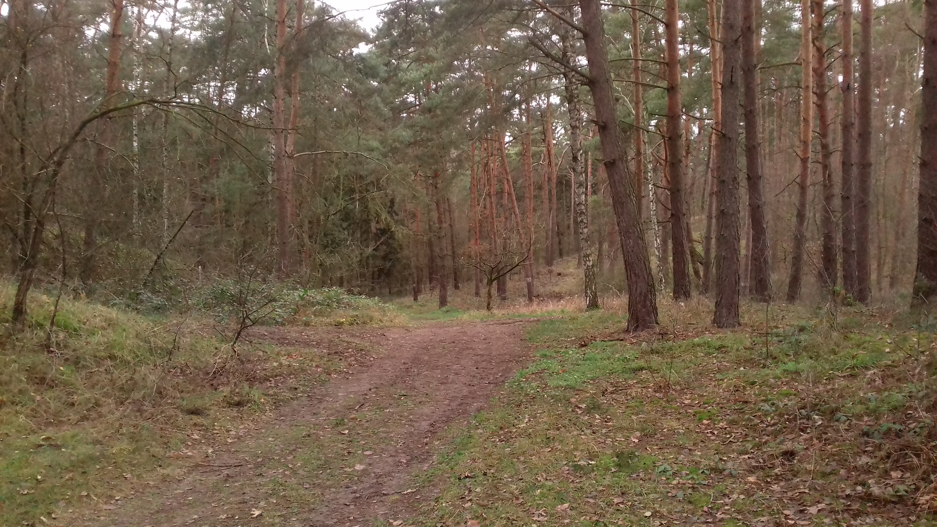 Szlak turystyczny pieszy nr 3583 na obrzeżach Żarnowca